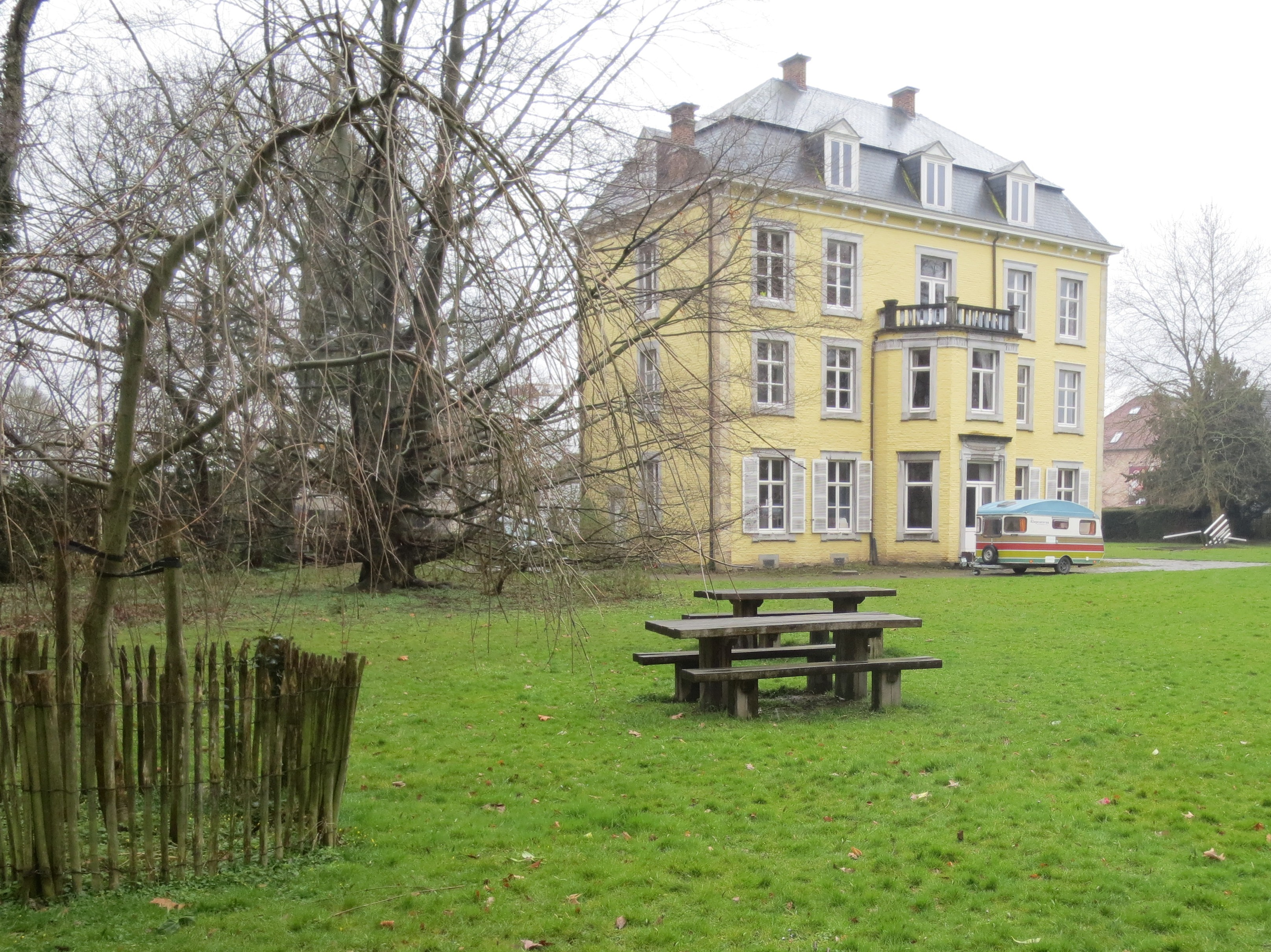 Achterzijde van Kasteel de Fauconval, landhuis uit 1860 met park aan de Daaleindestraat 2 te Kortessem. This photo of immovable heritage has been taken in the Flemish Region